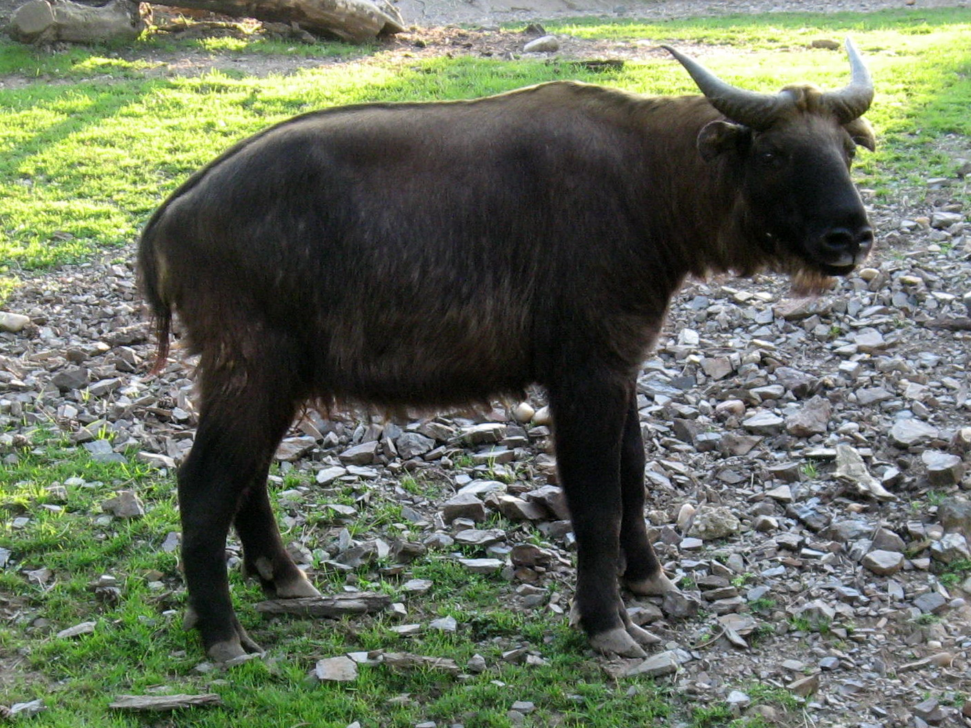 Takin indický